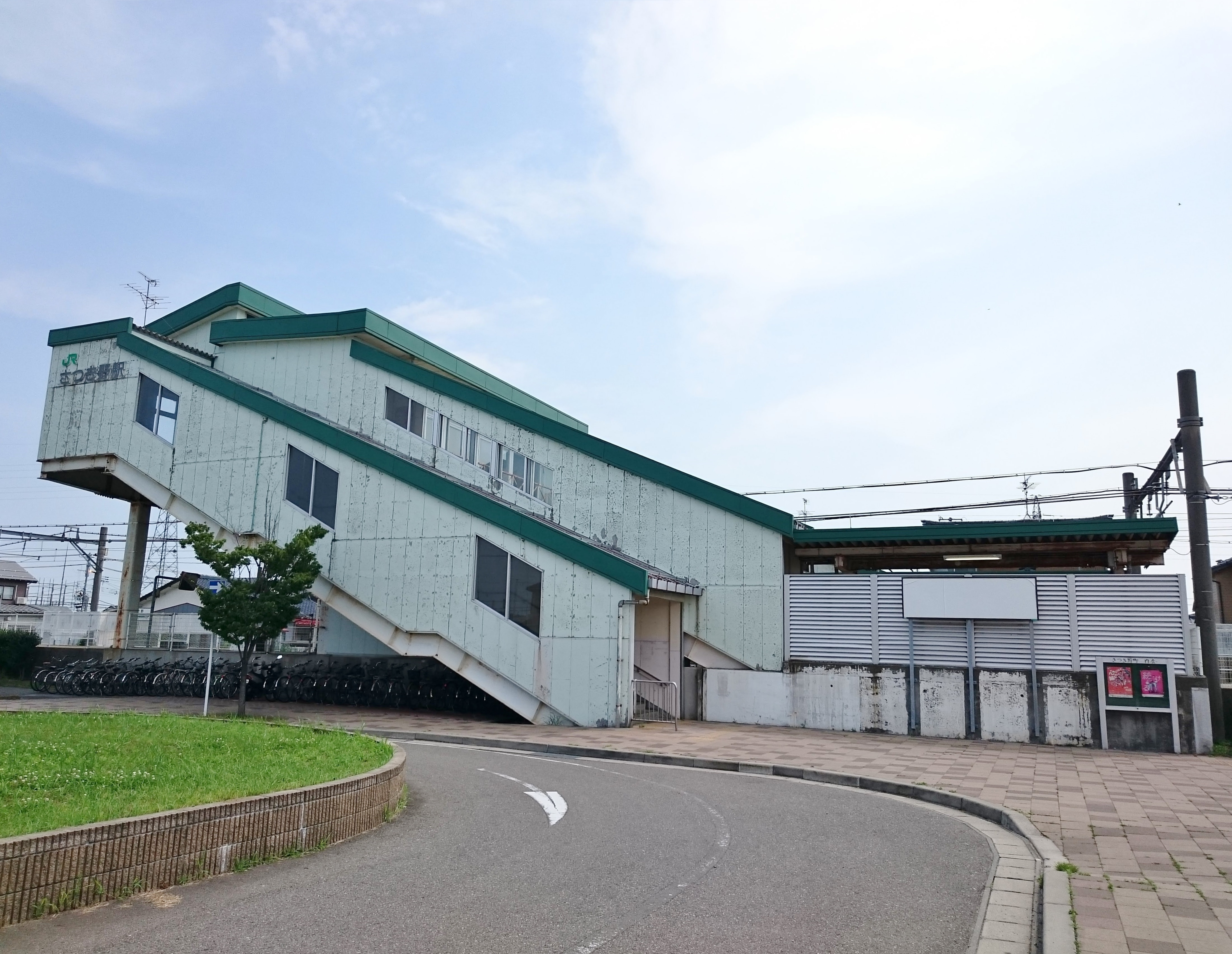 さつき野駅の西口